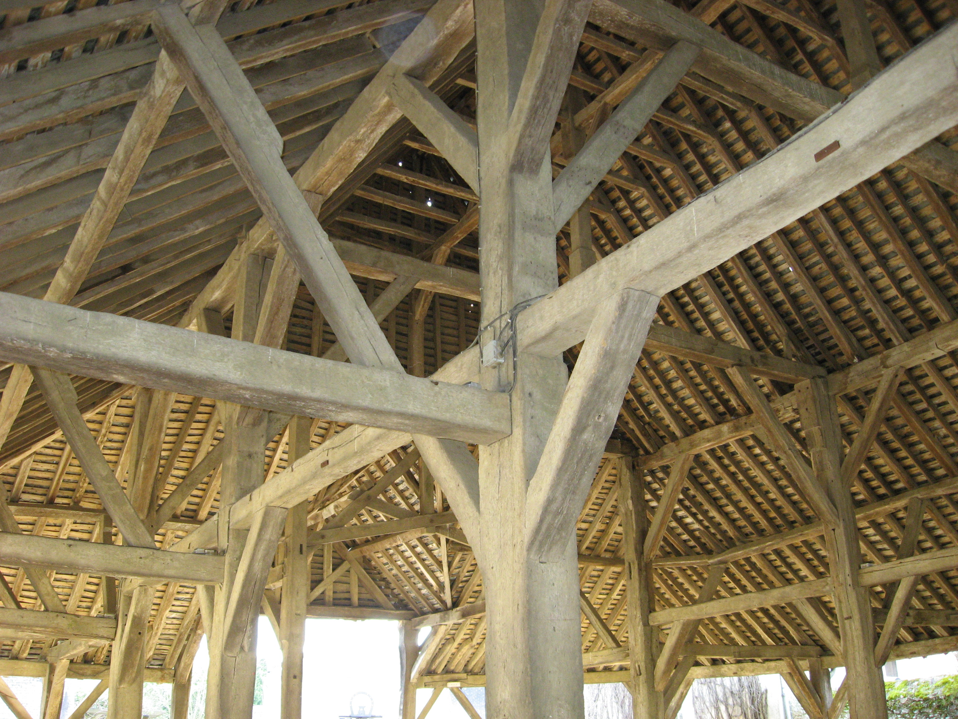 "Les Halles" de Saint-Denis-d'Anjou, département de la Mayenne (numéro de département : 53) France, Vue intérieure de la charpente